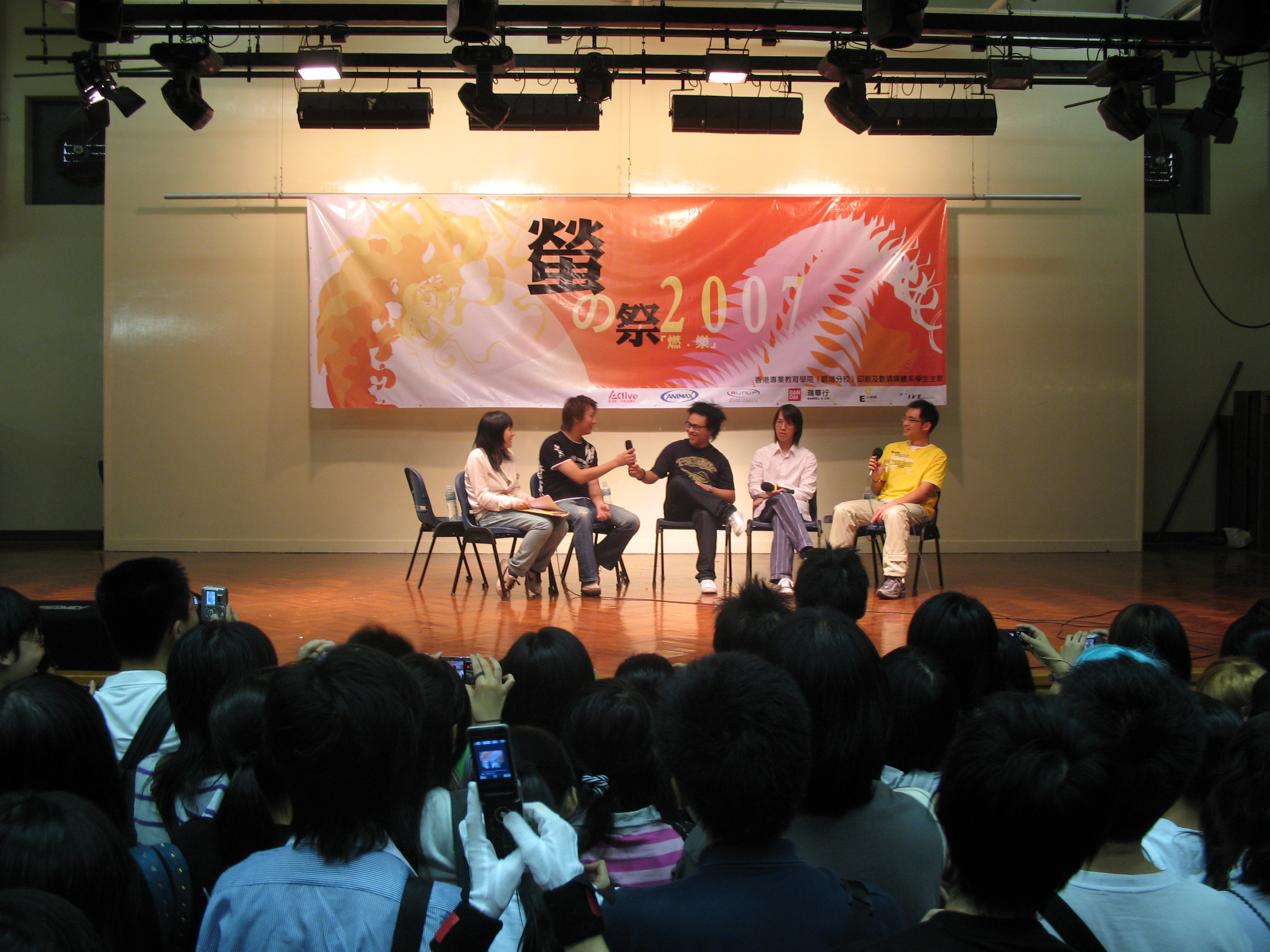 香港四名配音員（左起：梁偉德、黃榮璋、李致林、黃啟昌）於蛍の祭／螢之祭